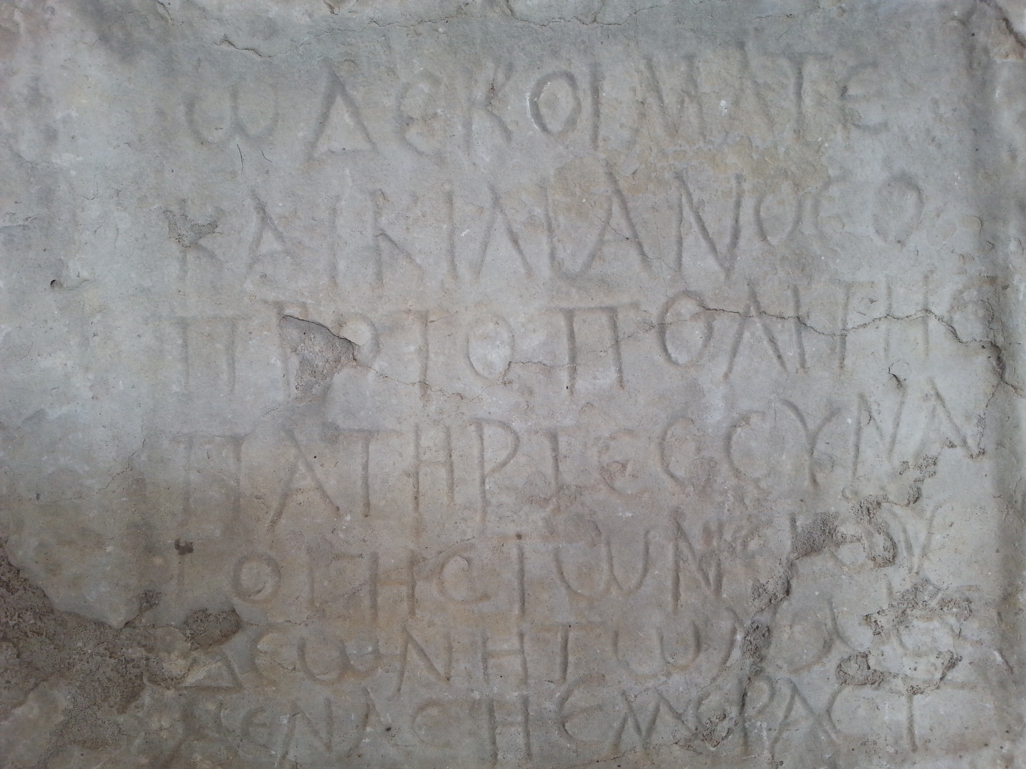 Epitafio con el nombre en griego de Caecilianus, muerto a la edad de cuarenta y cinco años, ocho meses, tres días. El difunto es calificado de jefe de la comunidad judía de Volubllis y padre de su sinagoga. Calcárea. Siglo III.